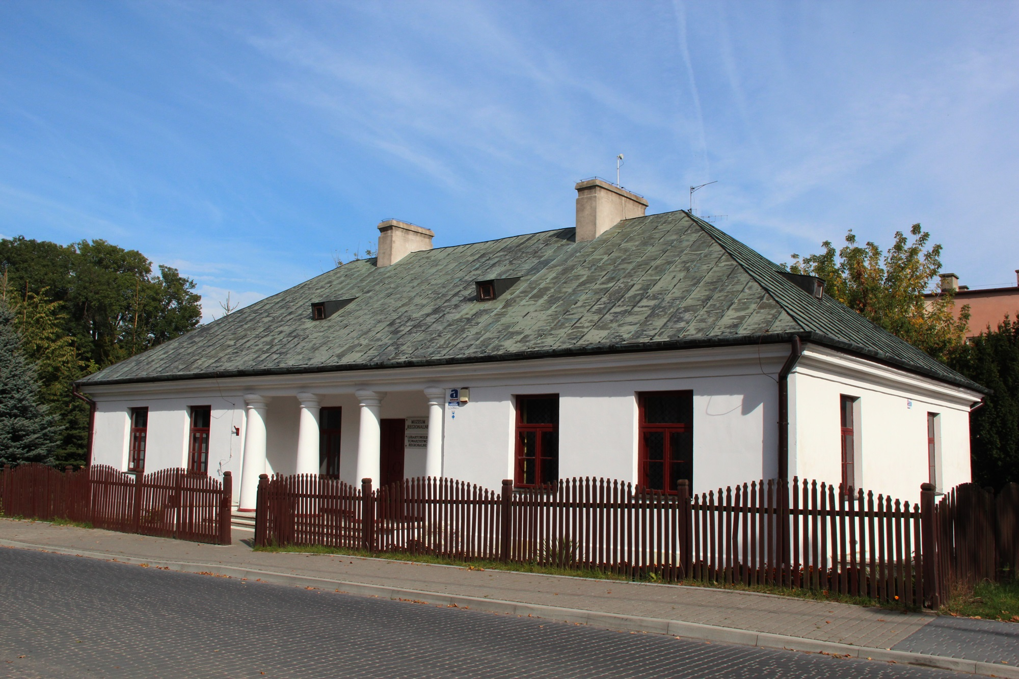 Lubartów, dworek, ob. Muzeum Regionalne, XVIII/XIX